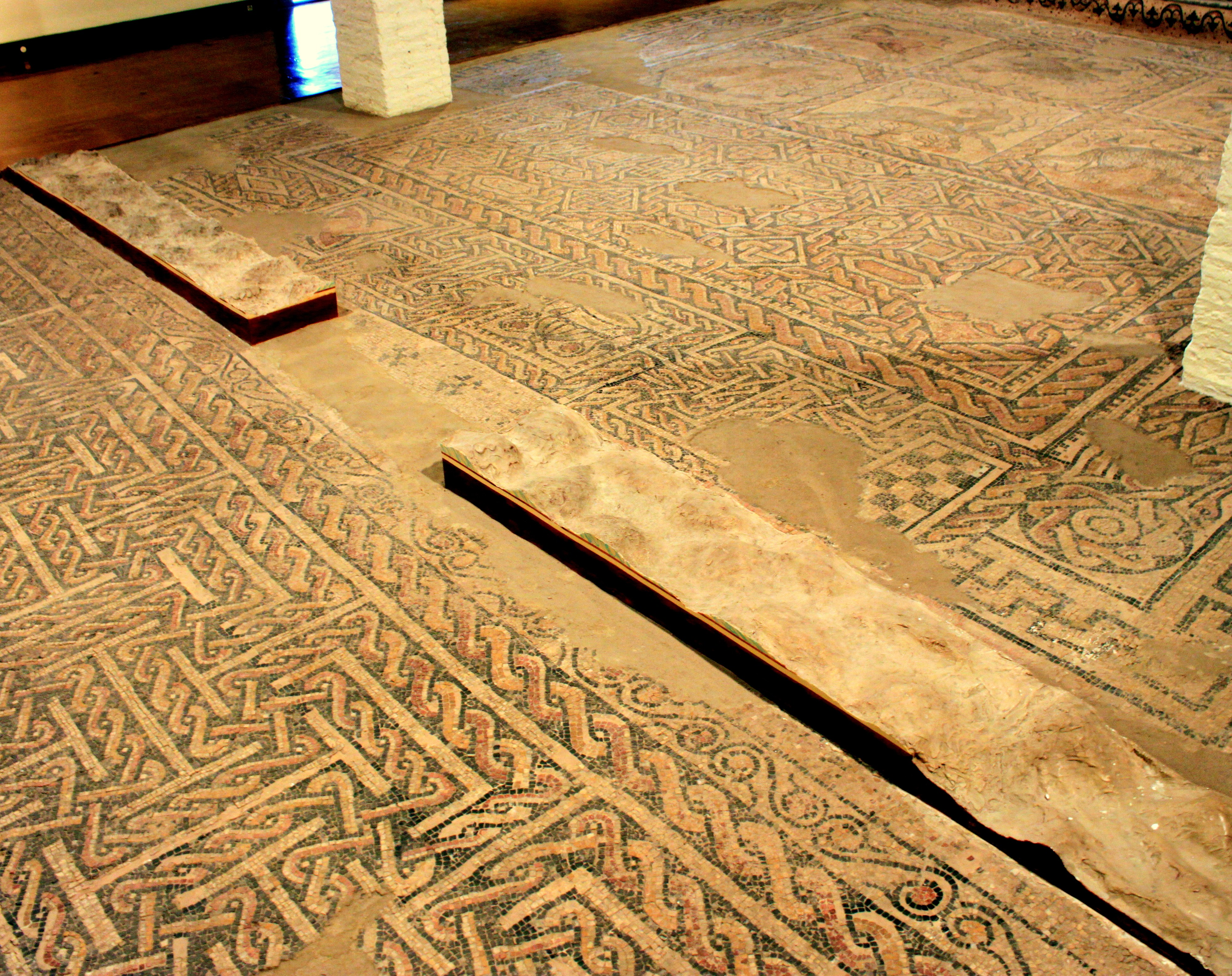 Camino de la Vega de Albalate (Calanda, Teruel). La villa: acceso a la 2ª habitación.